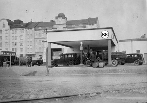 Viipurin BK:n huoltoasema valmistui toukokuussa vuonna 1932. Asema sijaitsi Revonhännässä, linja-autoaseman vieressä